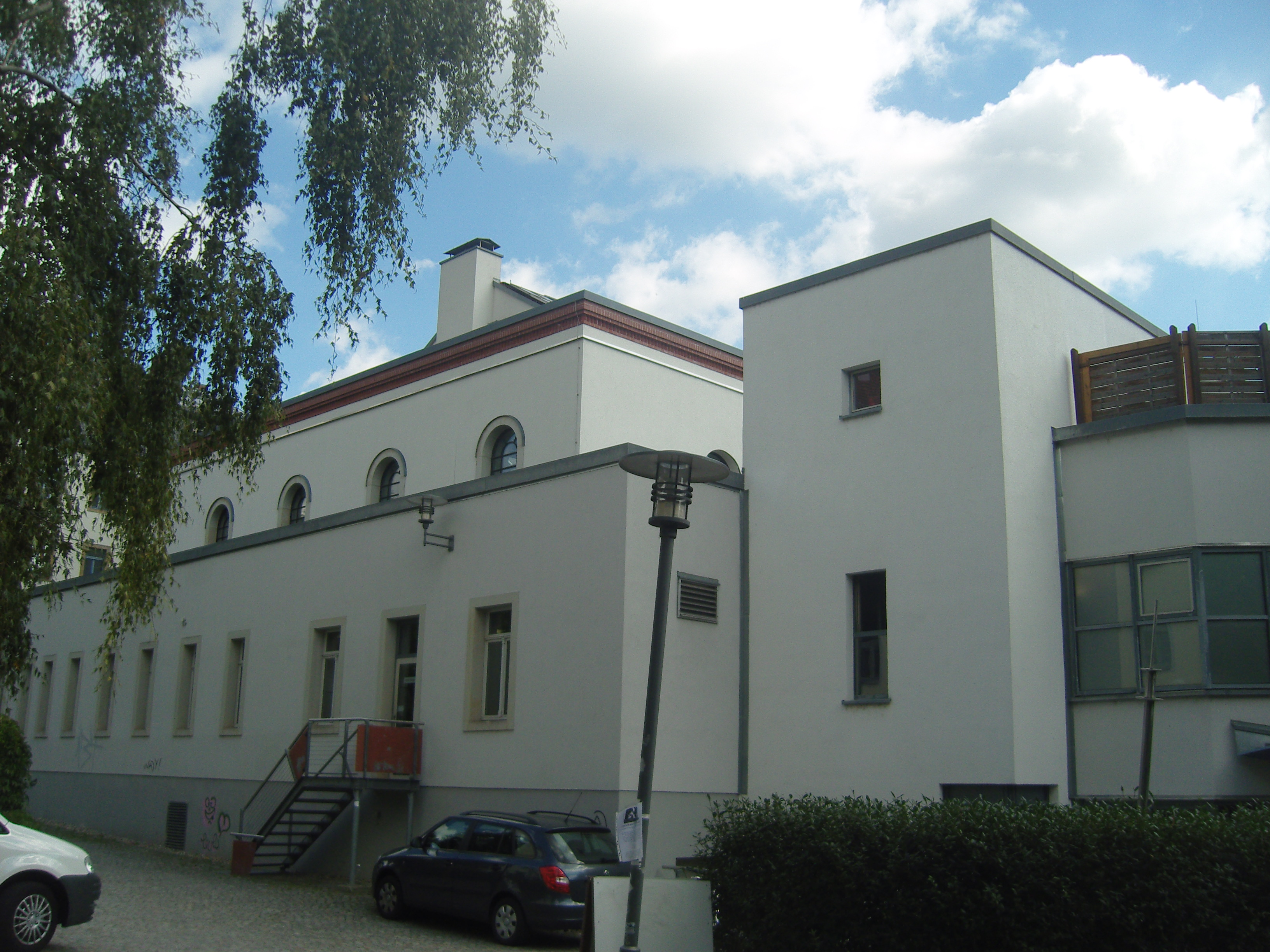 Denkmalgeschütztes Nordbad in der Louisenstraße 48 in Dresden